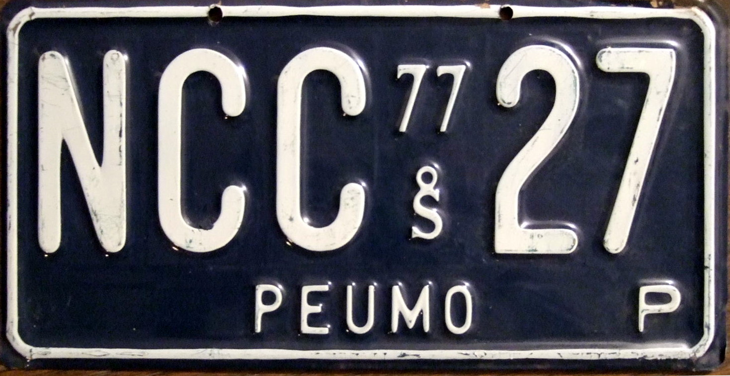 CHILE 1977 Puemo